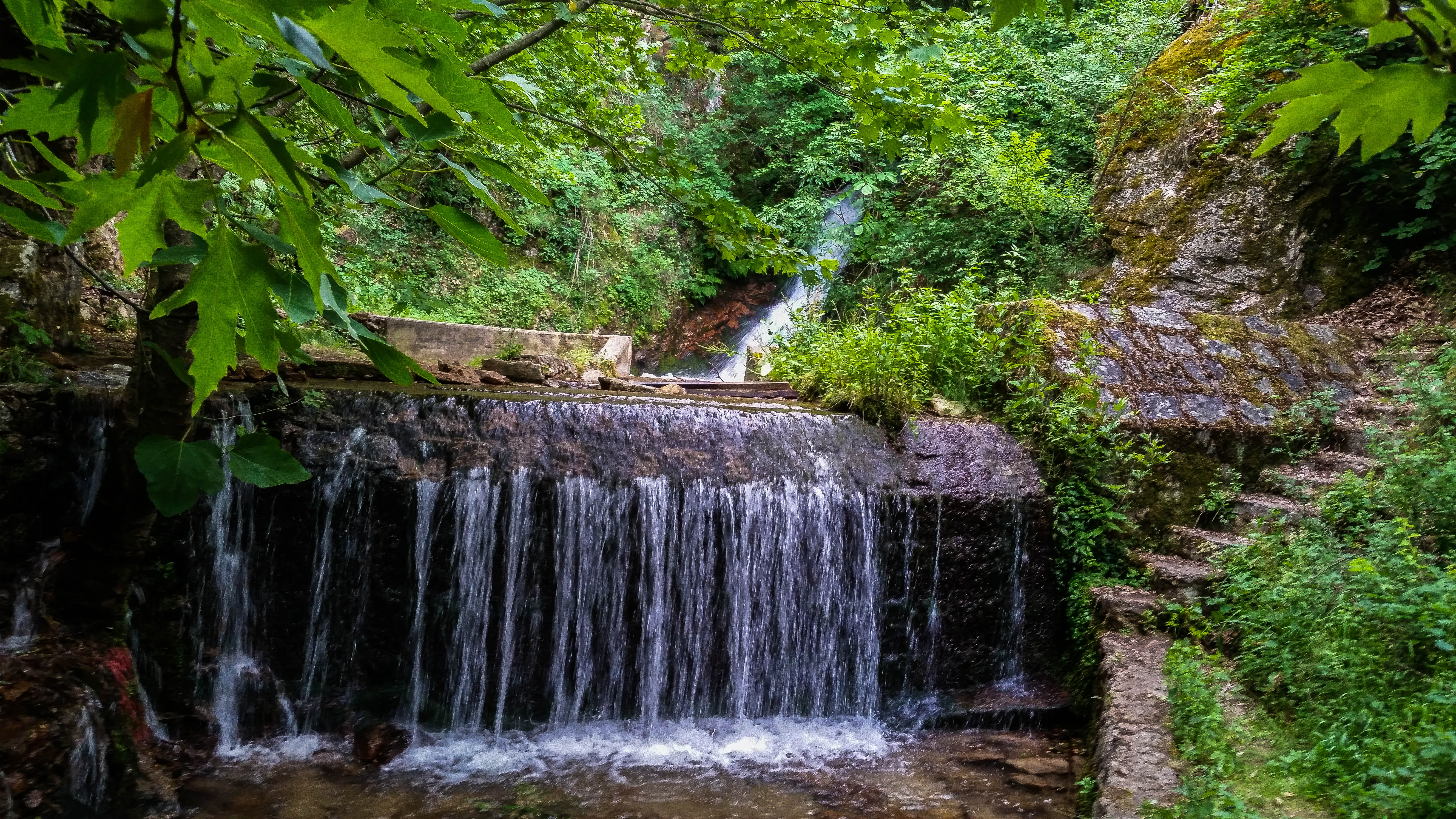 Габровски водопад